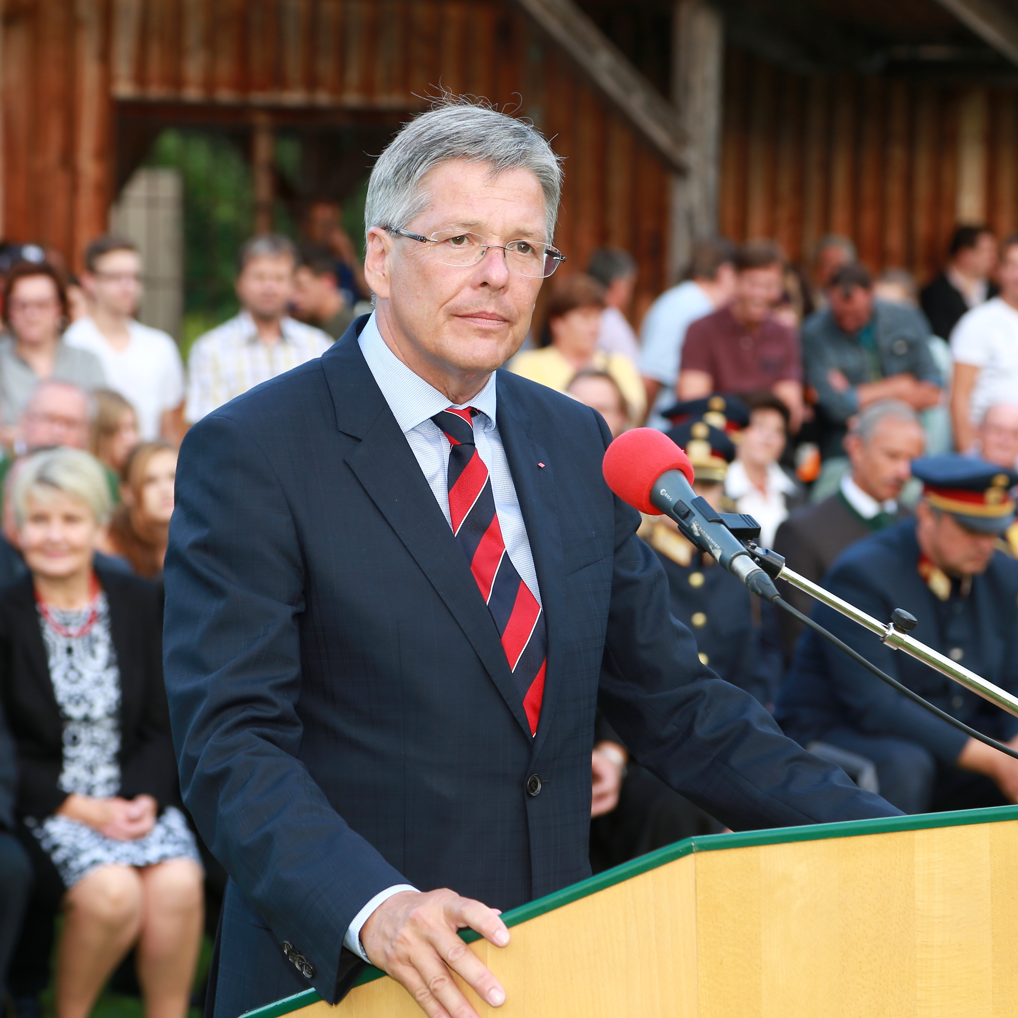 Kaiser